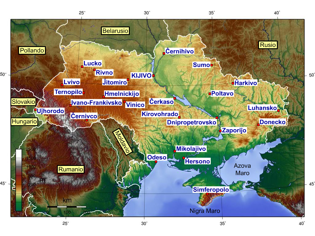 Provincocentroj de Ukrainio